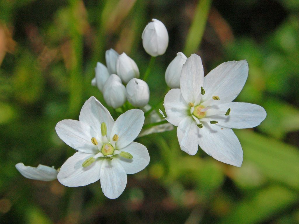 Iridaceae - Allium neapolitanum